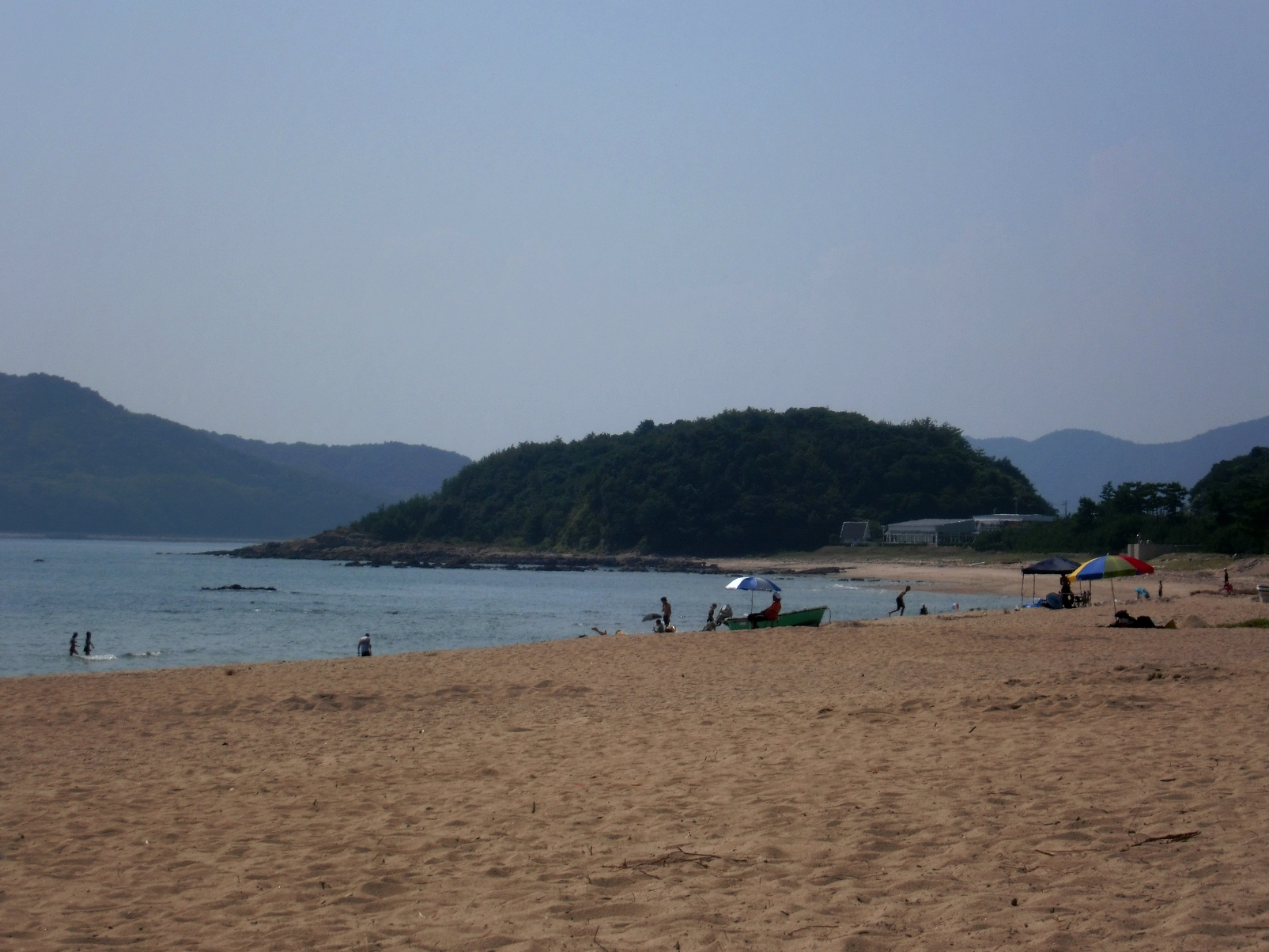 虹が浜